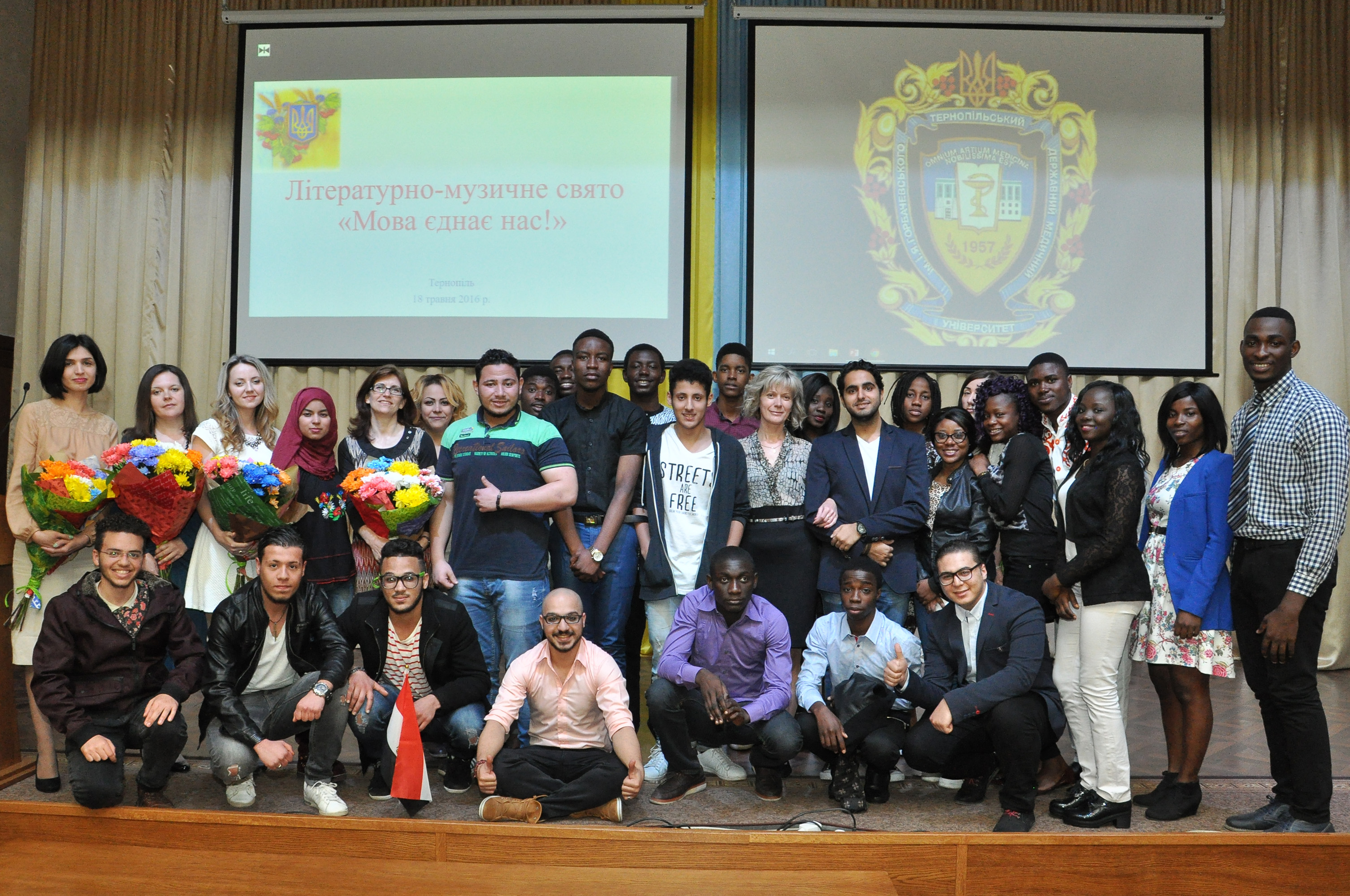 Літературно-музичне свято «Мова єднає нас», зорганізоване слухачами підготовчого відділення факультету іноземних студентів ТДМУ.